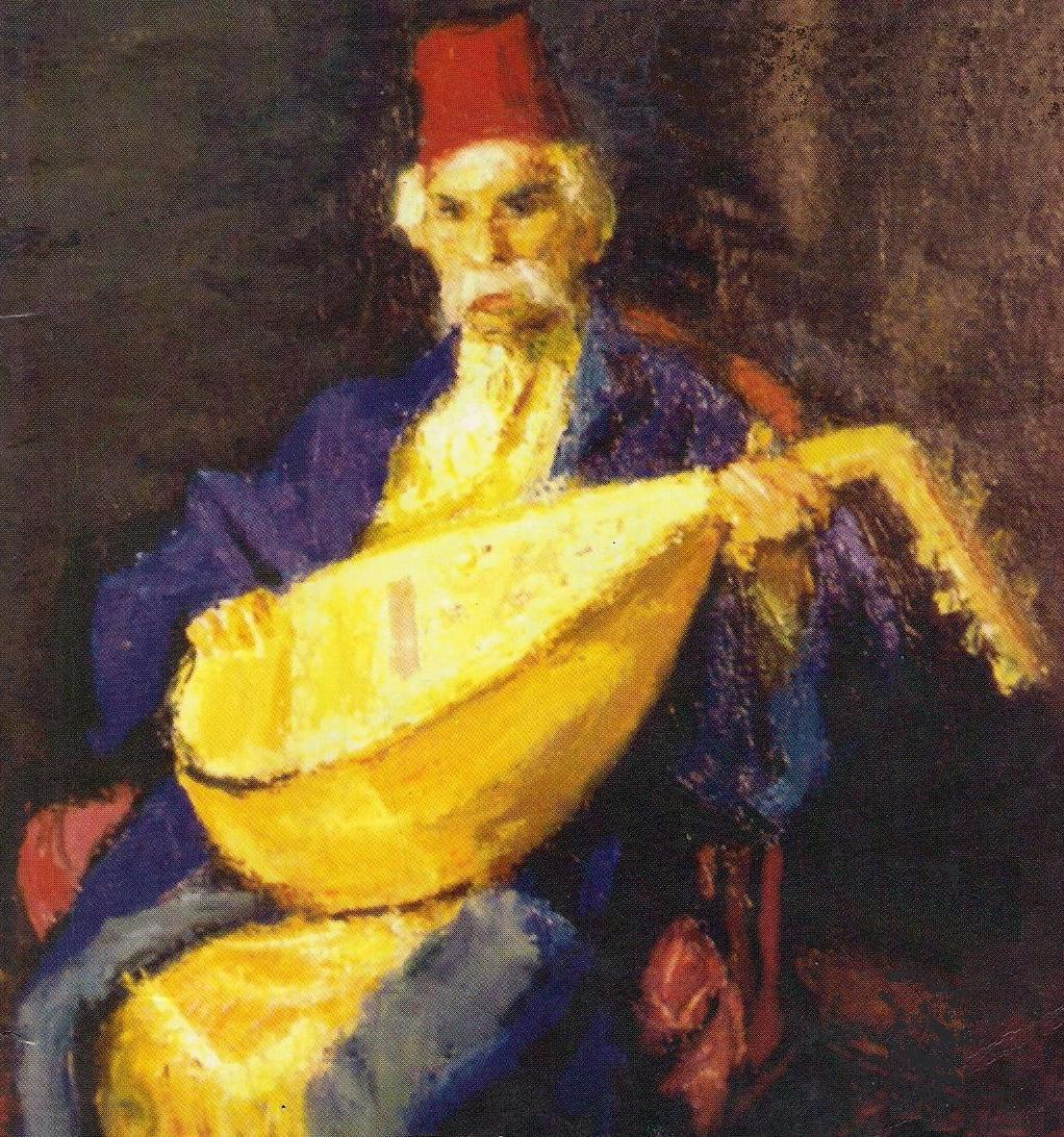 „Barbu Lăutarul”, de Iosif Iser, ulei de pânză (Muzeul Naţional de Artă Bucureşti)